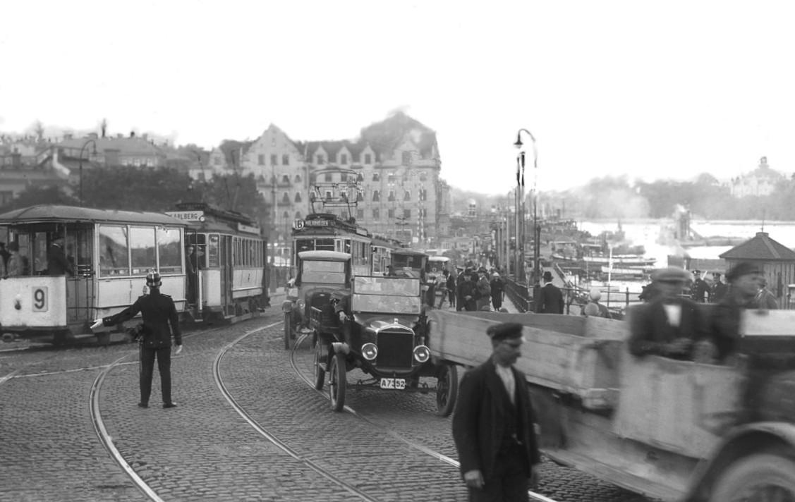 Trafik på Slussen, vy mot Skeppsbron 1925